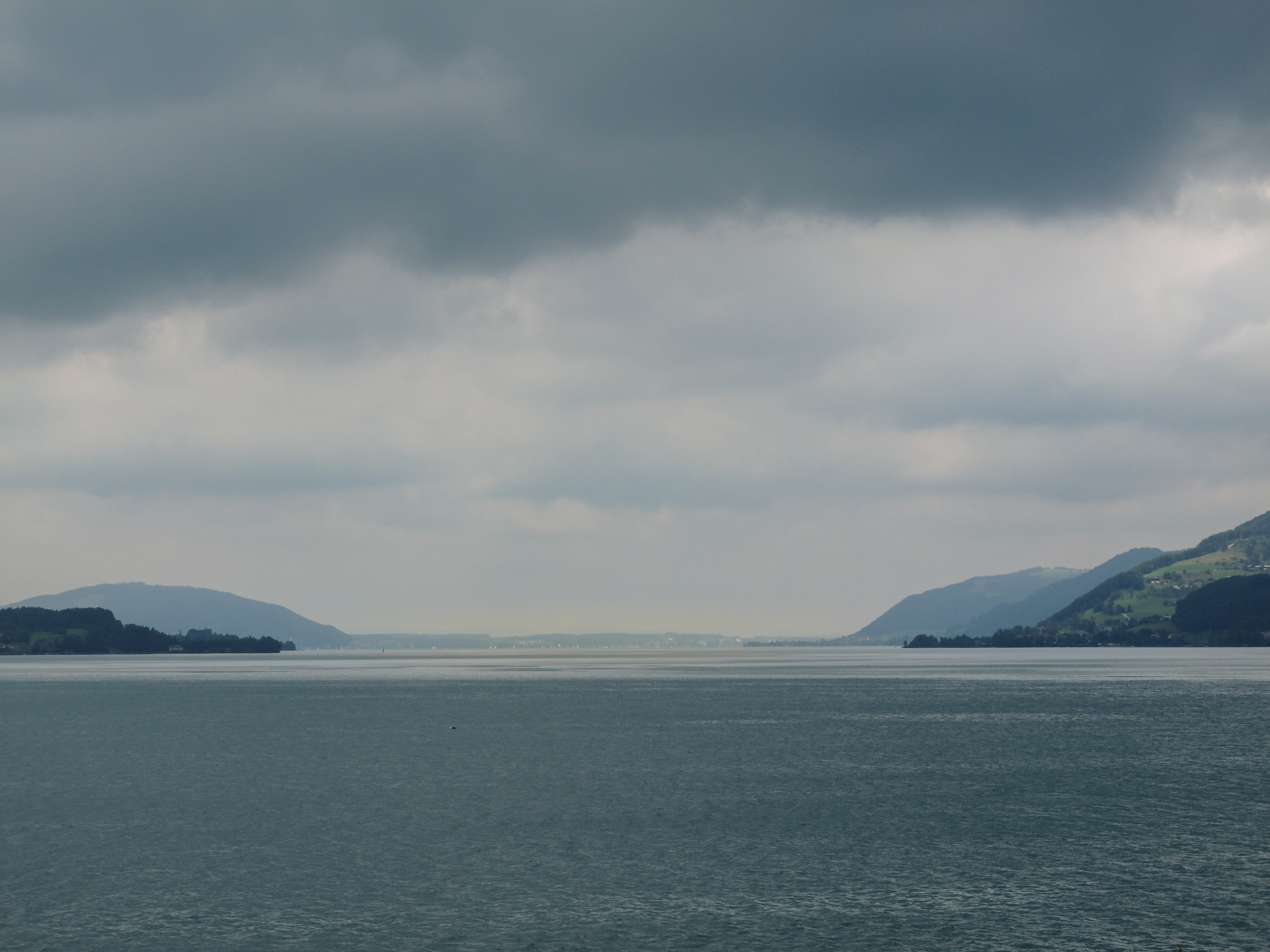 Attersee, tussen Missling en Steinbach